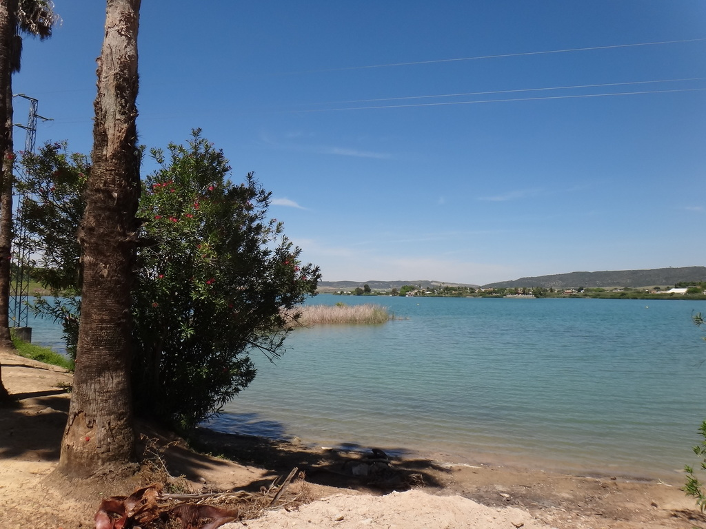 Presa de Arcos de la Frontera (Andalucía, España)